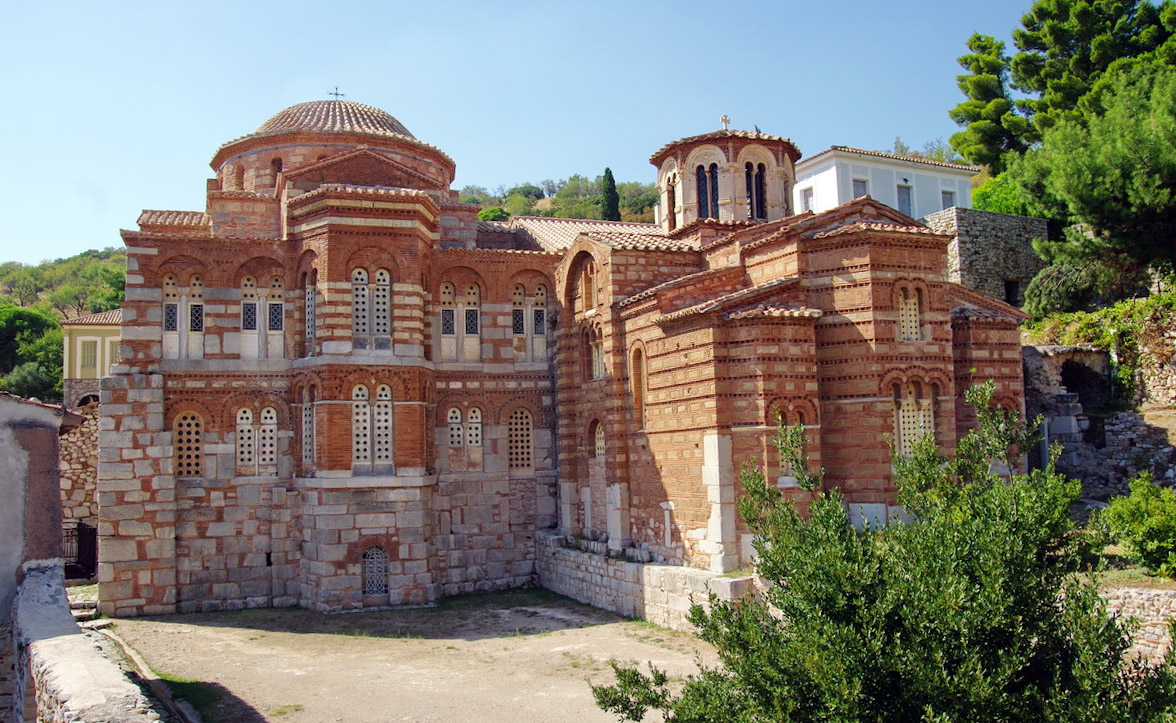 Katholikon links, Panagia rechts, Kloster Osios Loukas